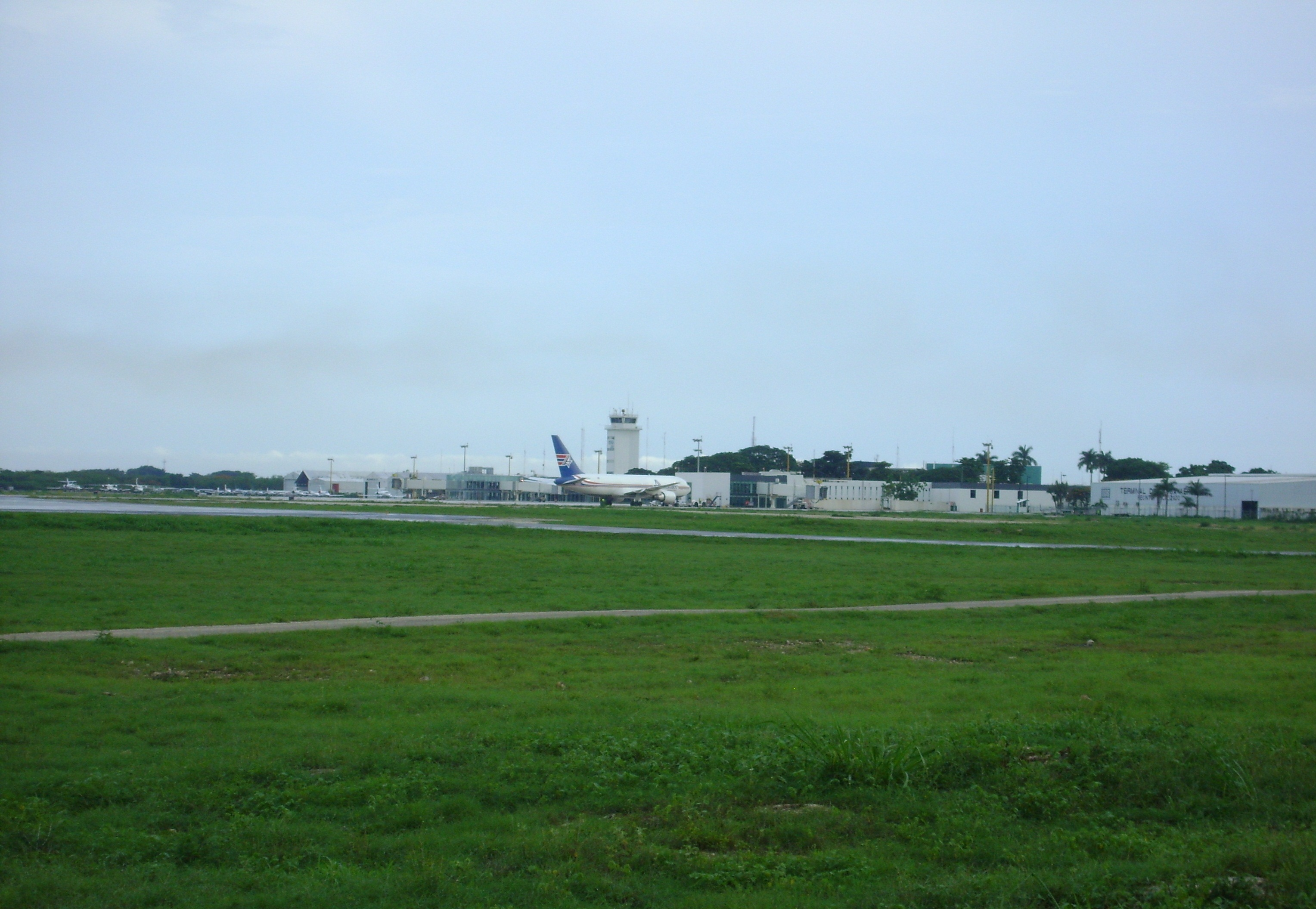 Terminal A & B del Aeropuerto Internacional Manuel Crescencio Rejón.